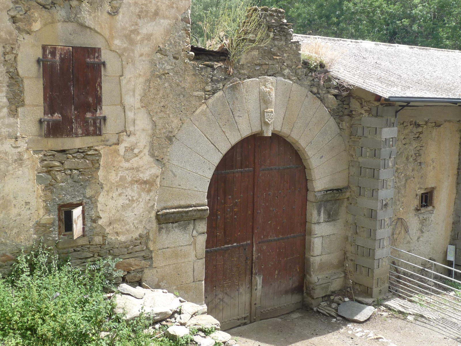 Bains de Llo, ancien bâtiment, Pyrénées-Orientales, France